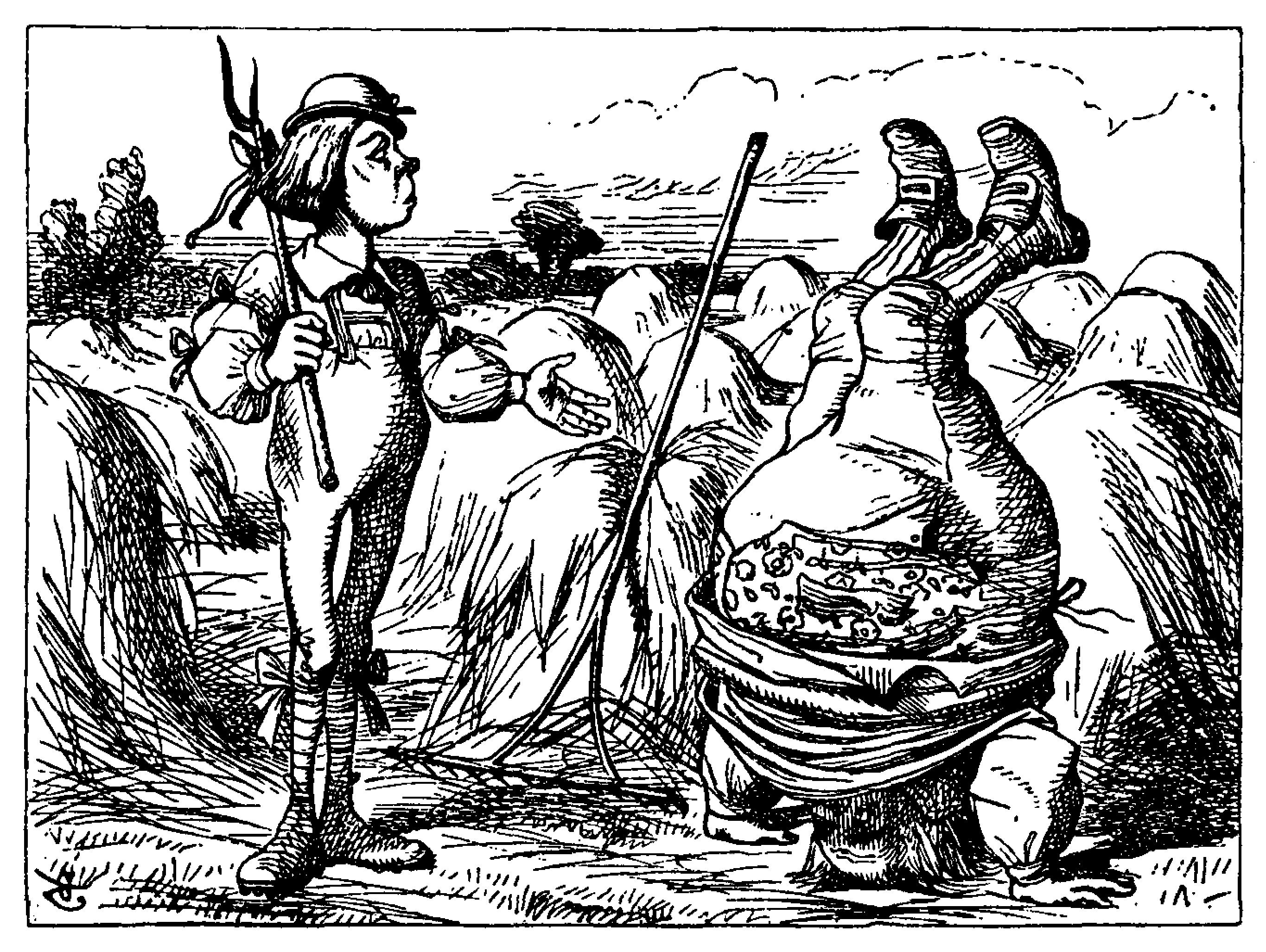 Alice’s Abenteuer im Wunderland Übersetzer: Antonie Zimmermann Orginal Titel: Alice's Adventures in Wonderland Illustrationen: John Tenniel